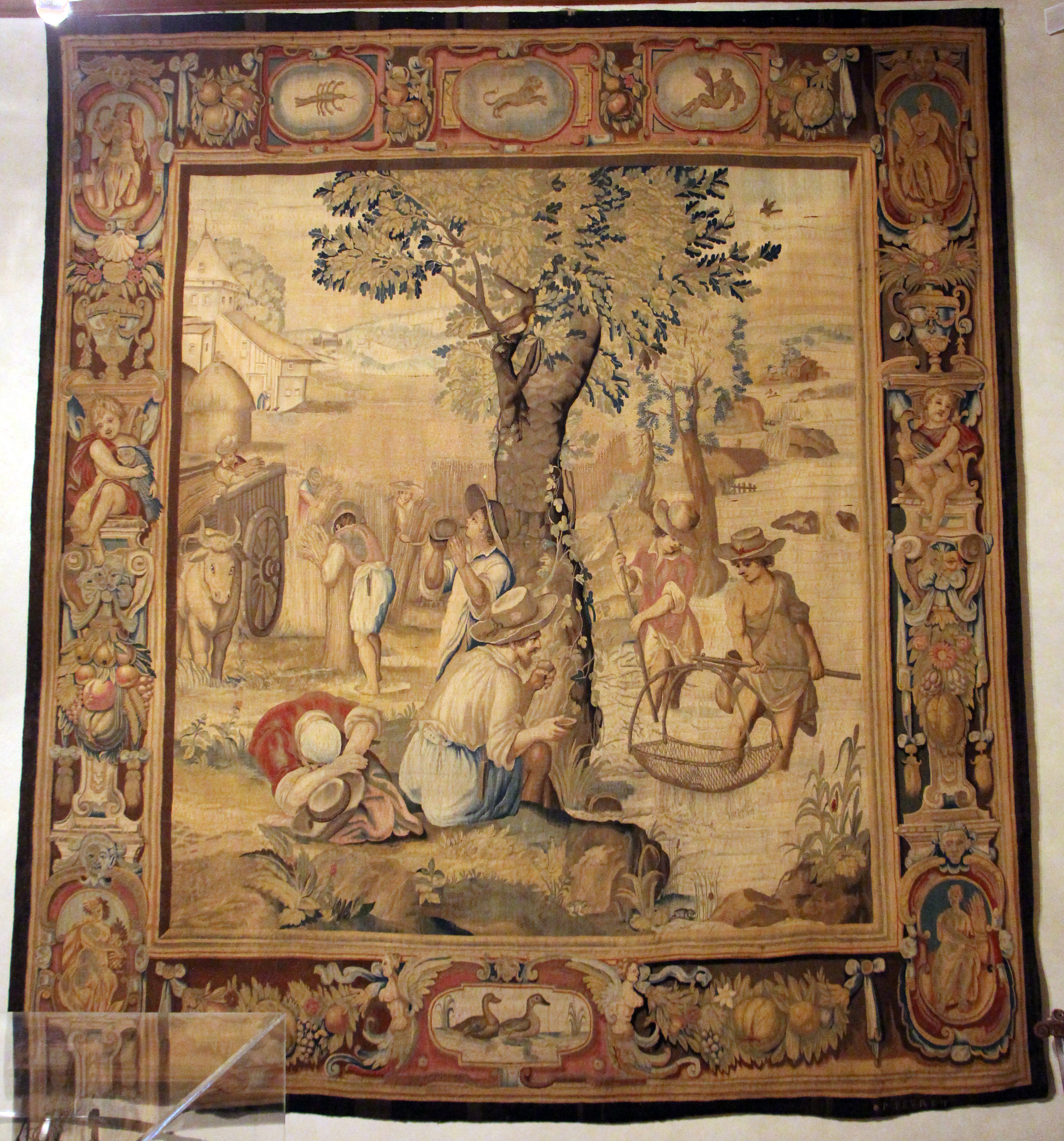 Villa medicea di Cerreto Guidi - MIBAC The making of this document was supported by Wikimedia CH. (Submit your project!) For all the files concerned, please see the category Supported by Wikimedia CH. This is a photo of a monument which is part of cultural heritage of Italy.